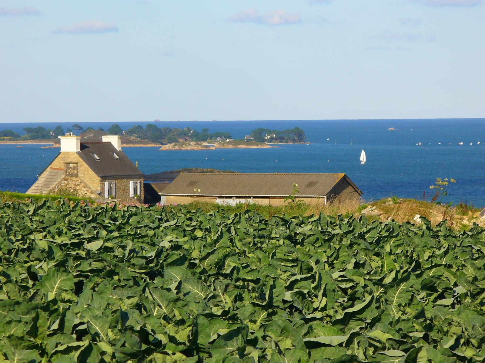 Saint-Pol de Léon, entre terre et mer.